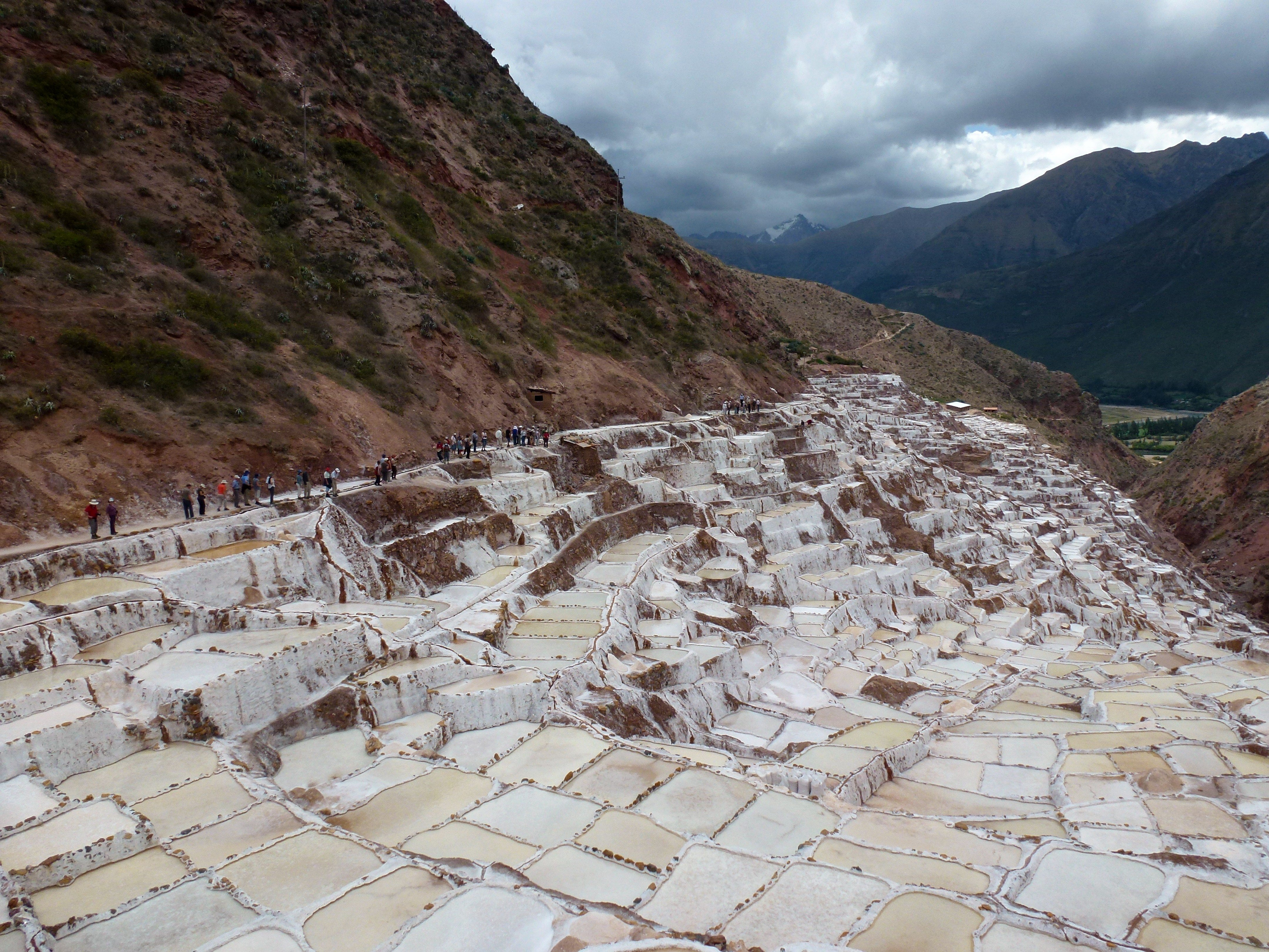 Salinas de Maras (Pérou) Pérou